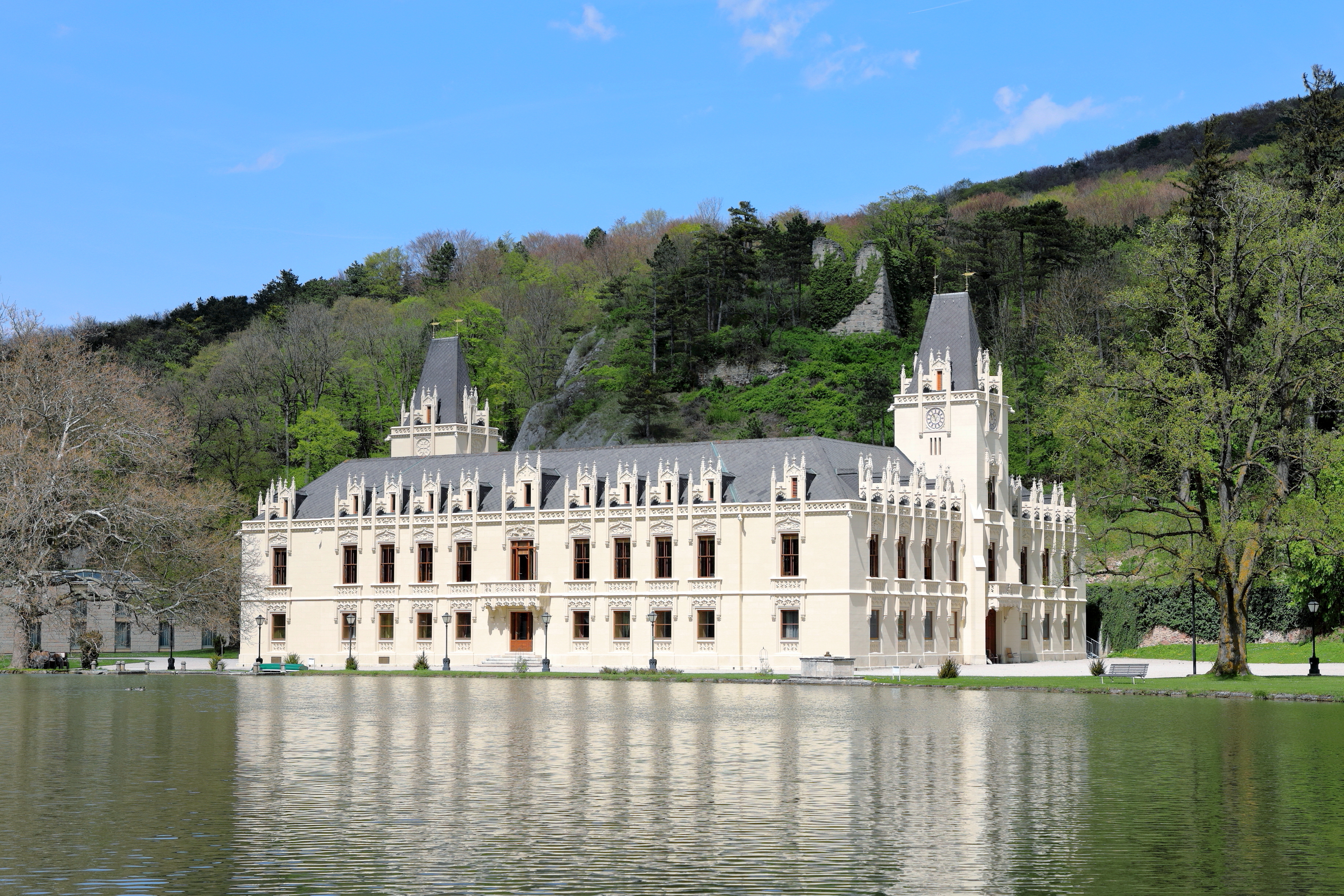 Südansicht des Schlosses Hernstein in der niederösterreichischen Marktgemeinde Hernstein und hinter dem Schloss der Rest des Wehrturmes der Burgruine Hernstein.Karl Josef Graf Heussenstein ließ zwischen 1727 und 1730 den vorhandenen Meierhof zu einem "Hofhaus" umbauen. 1798 wurde Freiherr Heinrich von Müller Besitzer der Liegenschaft und ließ den teilweise ummauerten Park und den künstlich aufgestauten Teich mit der Insel anlegen. 1830 erwarb Erzherzog Rainer das schlichte Anwesen, das aus vier zweigeschossigen Trakten bestand, die sich um einen rechteckigen Innenhof gruppierten. Sein Sohn, Leopold Ludwig, beschloss 1855 das Gebäude als Jagdschloss im Stil der von ihm bevorzugten englischen Gotik adaptieren zu lassen und beauftragte diesbezüglich Theophil von Hansen, der dabei eine der bedeutendsten Anlagen des Historismus schuf. 1963 erwarb die Wiener Handelskammer das Anwesen, sanierte es und eröffnet 1966 darin das Hernstein International Management Institute. 1976 wurde nordwestseitig des Schlosses ein moderner Hotelbau für die Seminargäste errichtet.